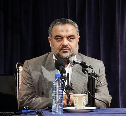 دکتر آیت اللهی